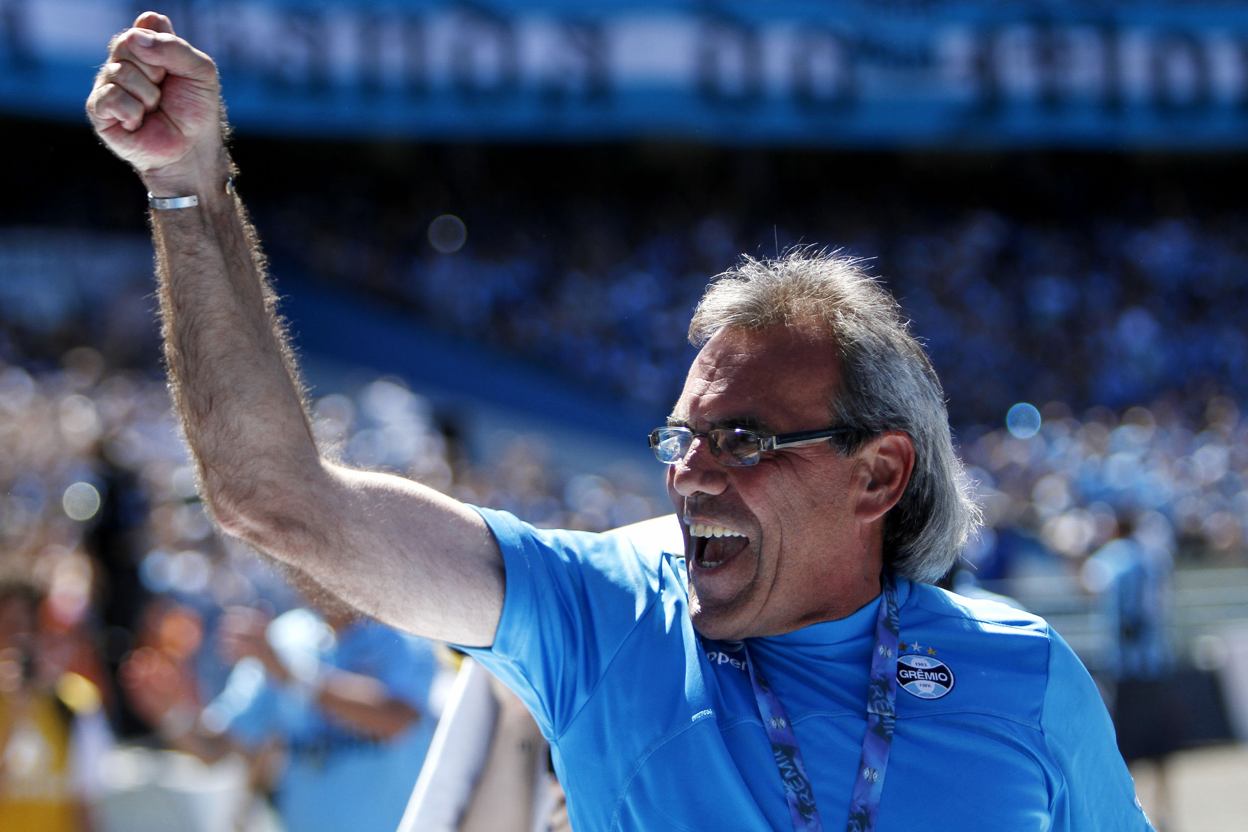 PORTO ALEGRE, RS - FUTEBOL - 02.12.2012 - Mazarroppi durante a homenagem do Grêmio para os seus jogadores antes do GRENAL deste domingo, as 17h, no último jogo do Estádio Olímpico. A equipe tricolor se despede do velho Monumental para jogar na Arena Porto-Alegrense a partir do próximo final de semana, dia 08, numa partida amistosa contra o Hamburgo-ALE. Foto: Guilherme Testa